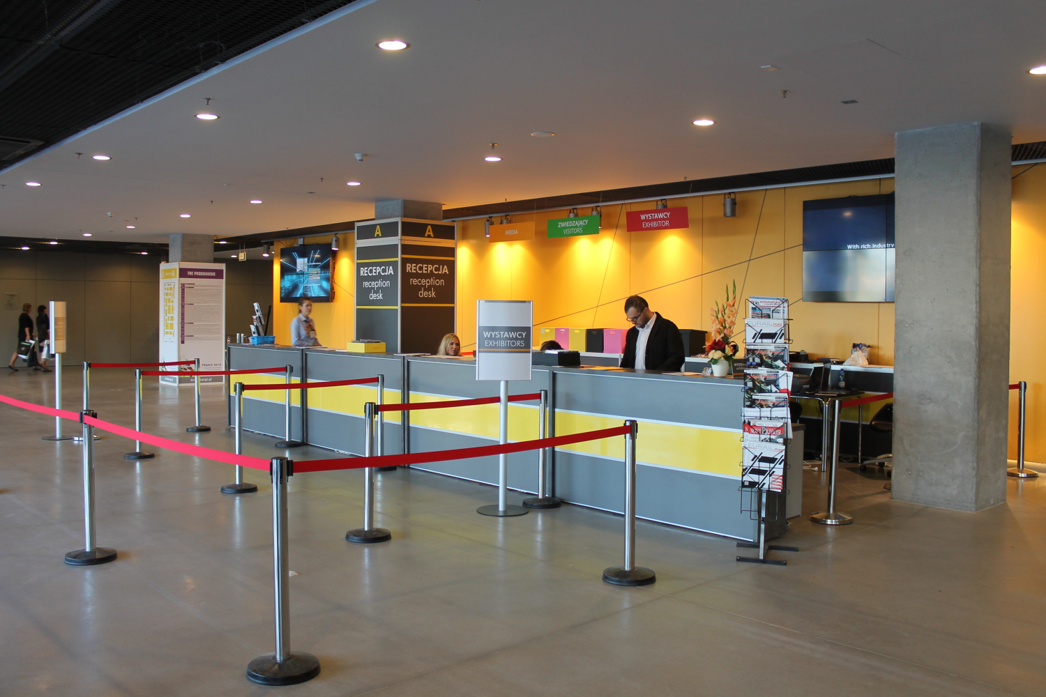 Recepcja w hali A AmberExpo podczas targów Trako 2015. The making of this document was supported by Wikimedia Polska Association, within Wikigrant no. WG 2015-34. English | polski | +/−